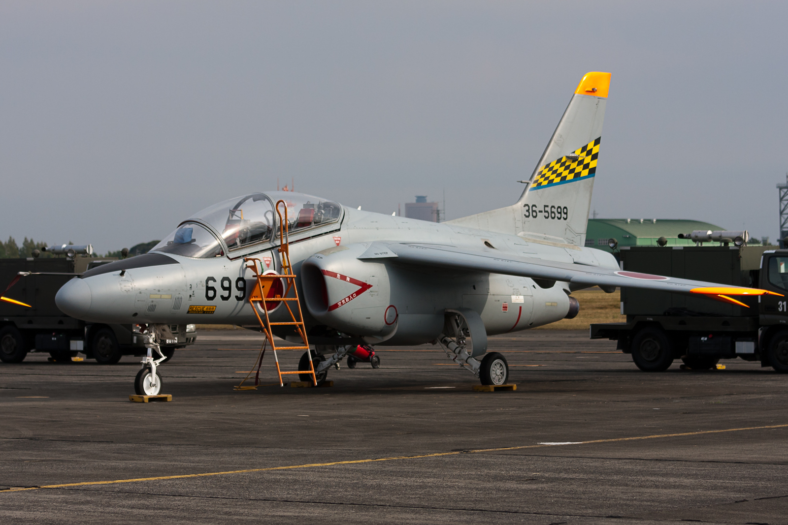 Aircraft: Kawasaki Heavy Industries, Ltd. T-4(sn:36-5699) Squadron: JASDF 1st Air Wing / 31SQ(第1航空団 飛行教育群 / 第31飛行隊) Base: JASDF Hamamatsu AB(RJNH) Shizuokai-ken, Japan 17/10/2010 JASDF Hamamatsu AB, Japan